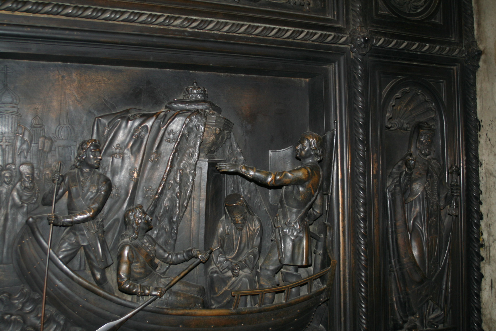 Исаакиевский собор (интерьеры)